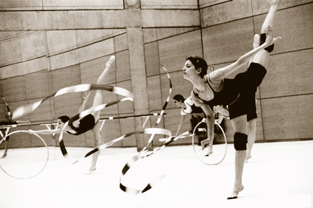 Lorena Guréndez, como componente del conjunto nacional de gimnasia rítmica, durante un entrenamiento en el CAR de Madrid en el año 2000. Al fondo, de izquierda a derecha, Igone Arribas, Beatriz Nogales y Carolina Malchair.